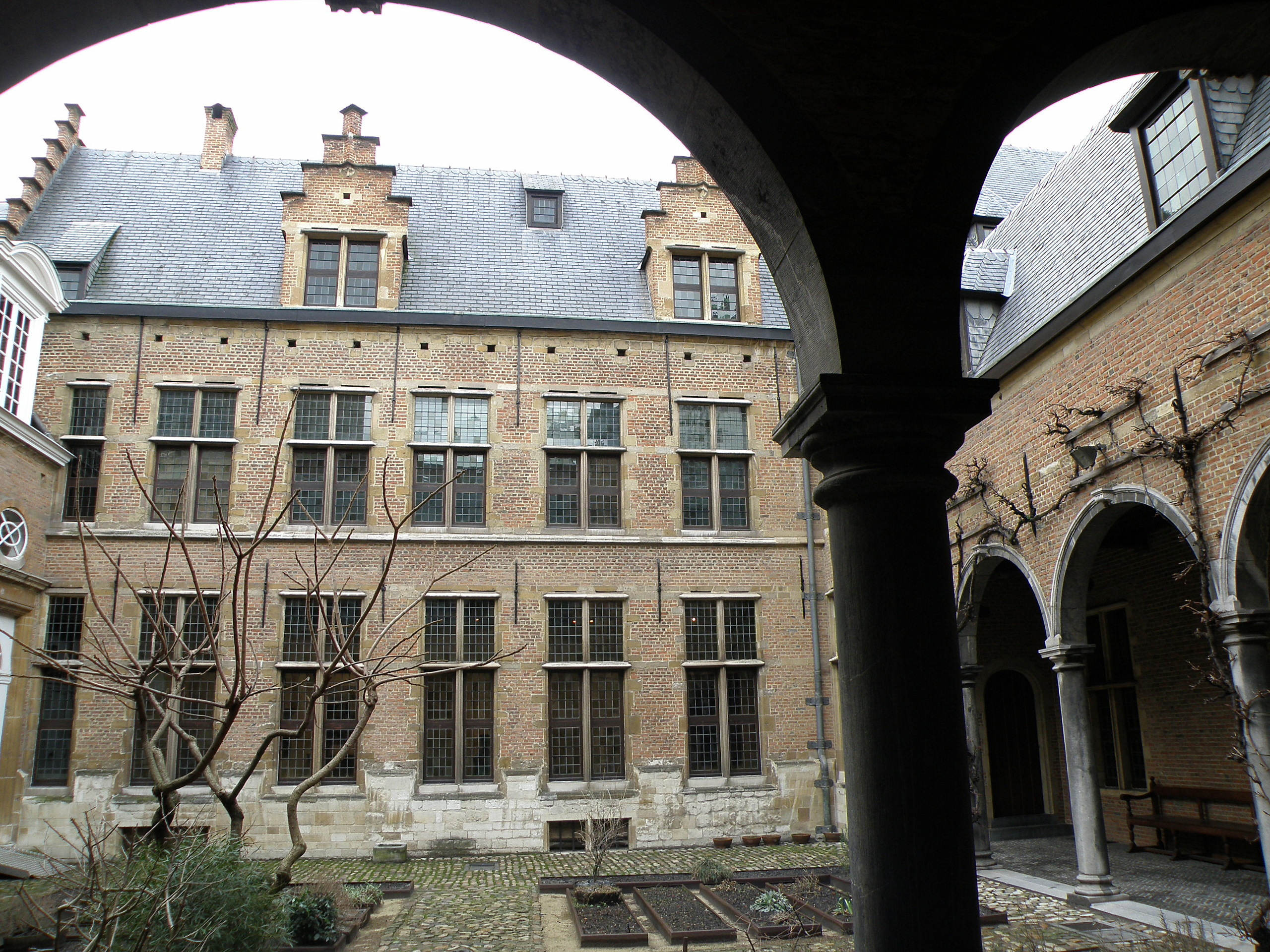 Antwerpen. Rockoxhuis, binnenplein.